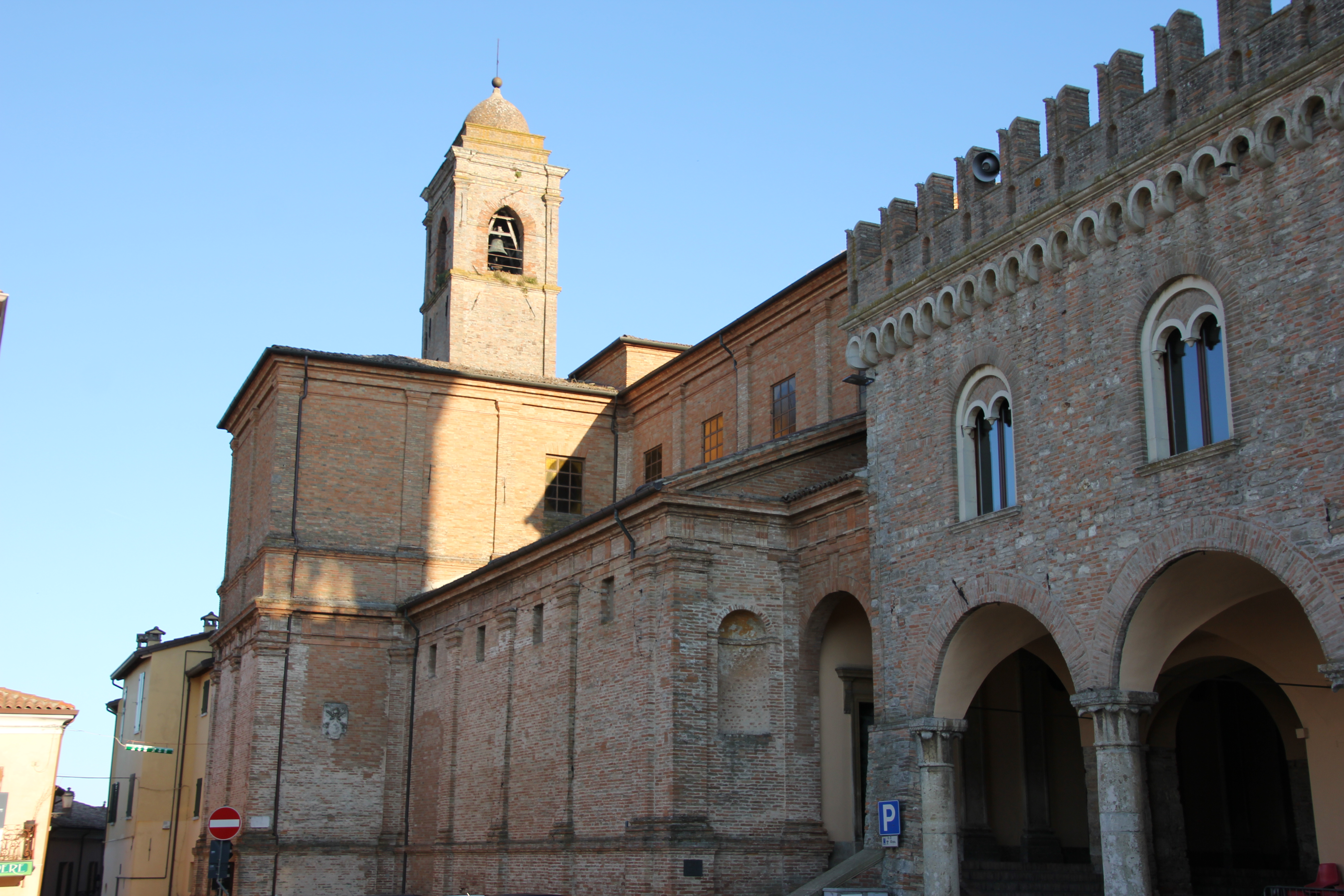 Bertinoro, concattedrale di Santa Caterina